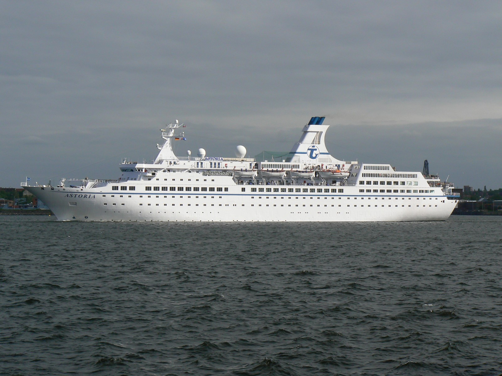 Kreuzfahrtschiff Astoria in der Kieler Förde.